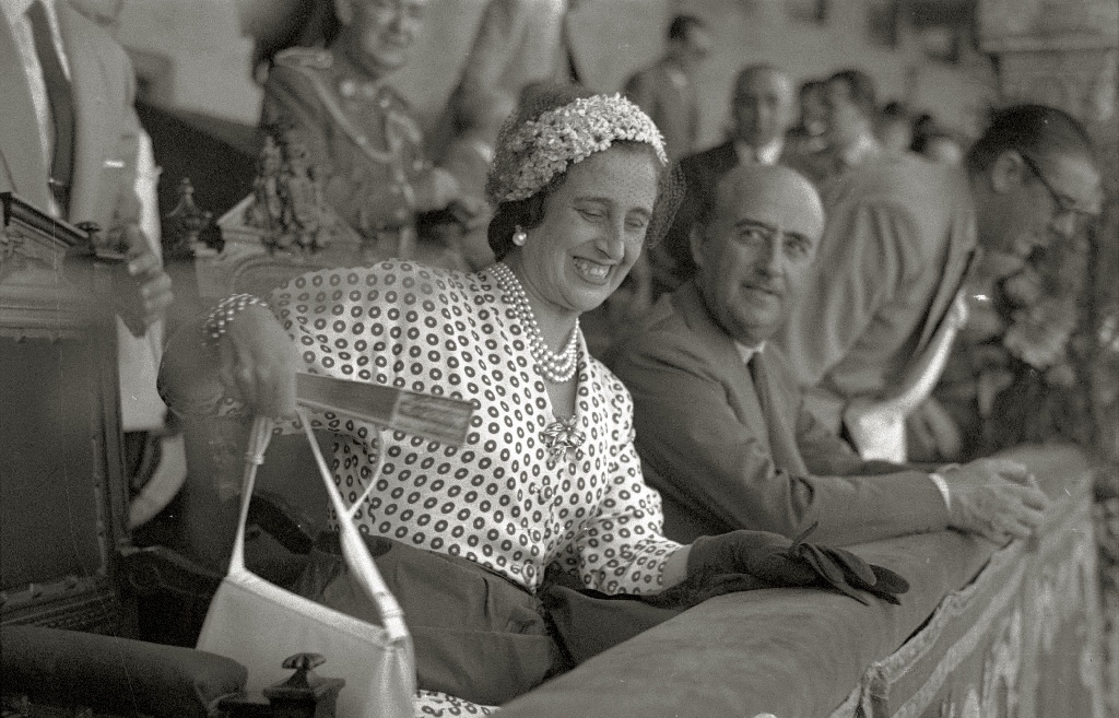 Título original: Francisco Franco y su esposa, Carmen Polo, en la plaza de toros 'El Txofre', en una corrida de la feria de abono de Semana Grande (3/5) Localización: San Sebastián (Guipúzcoa)